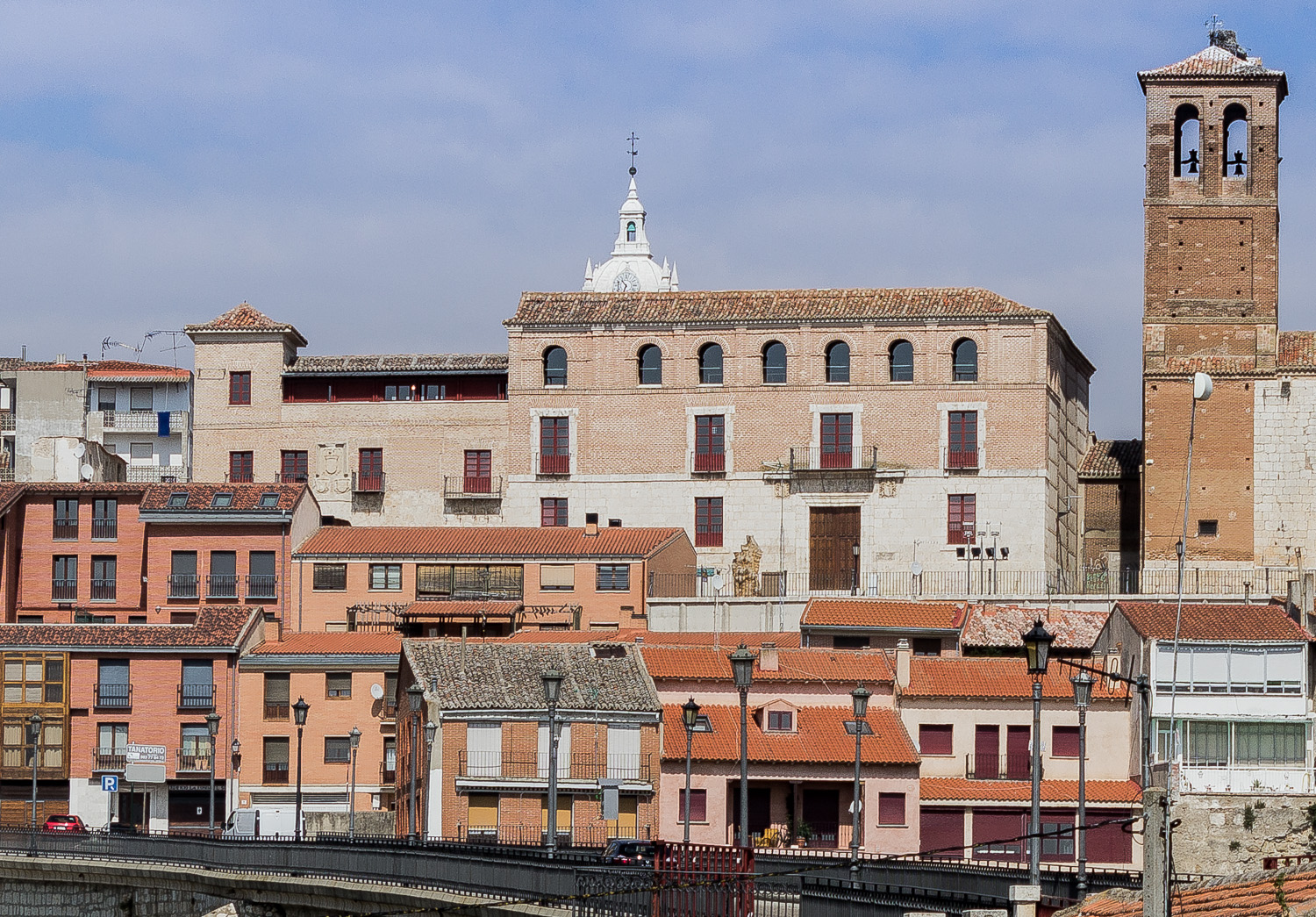 Casas del Tratado de Tordesillas donde se firmó el acuerdo entre España y Portugal en 1494 para repartirse el mundo.